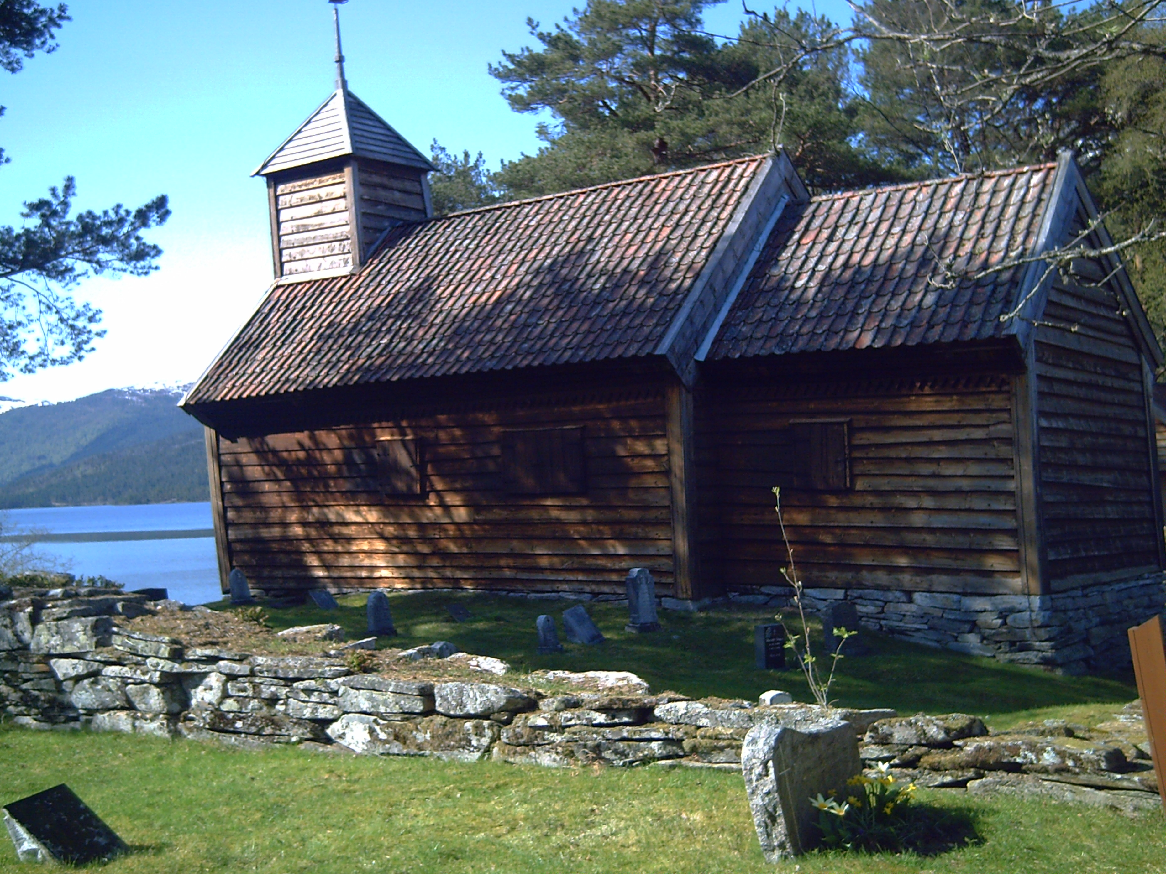 Hestad kapell, Hestad, kapell, Hestad Chapell